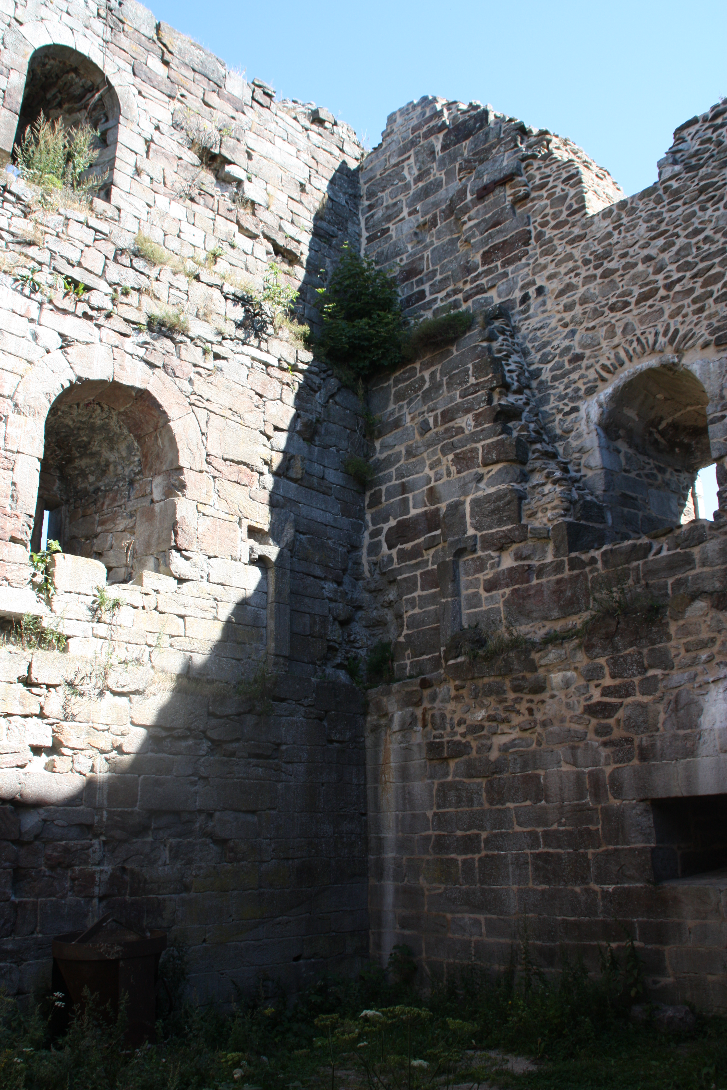 Burg Přimda, Westböhmen, Tschechische Republik. Nordostecke mit Fenstern und Kaminrest (von SW).